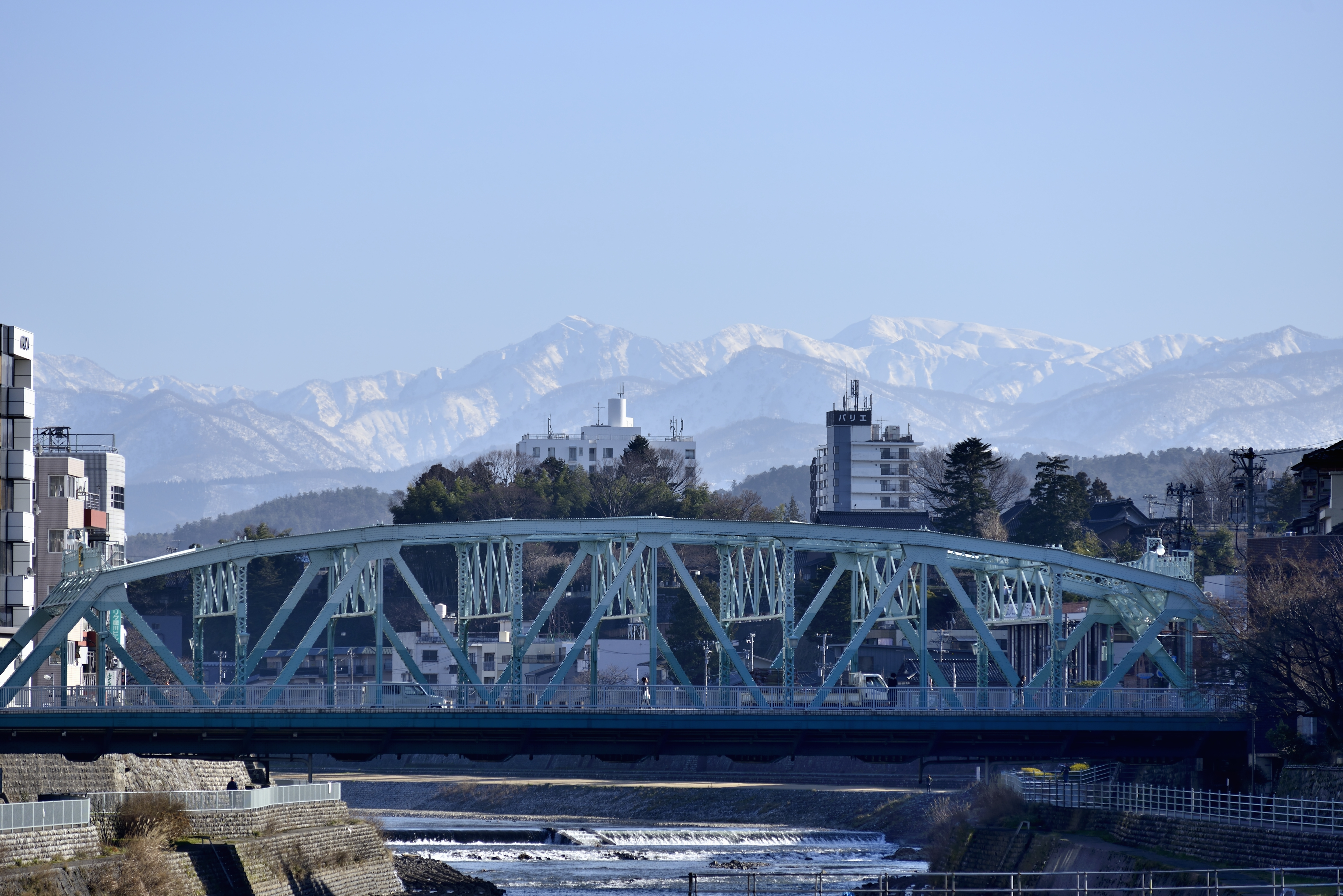 犀川大橋周辺の風景